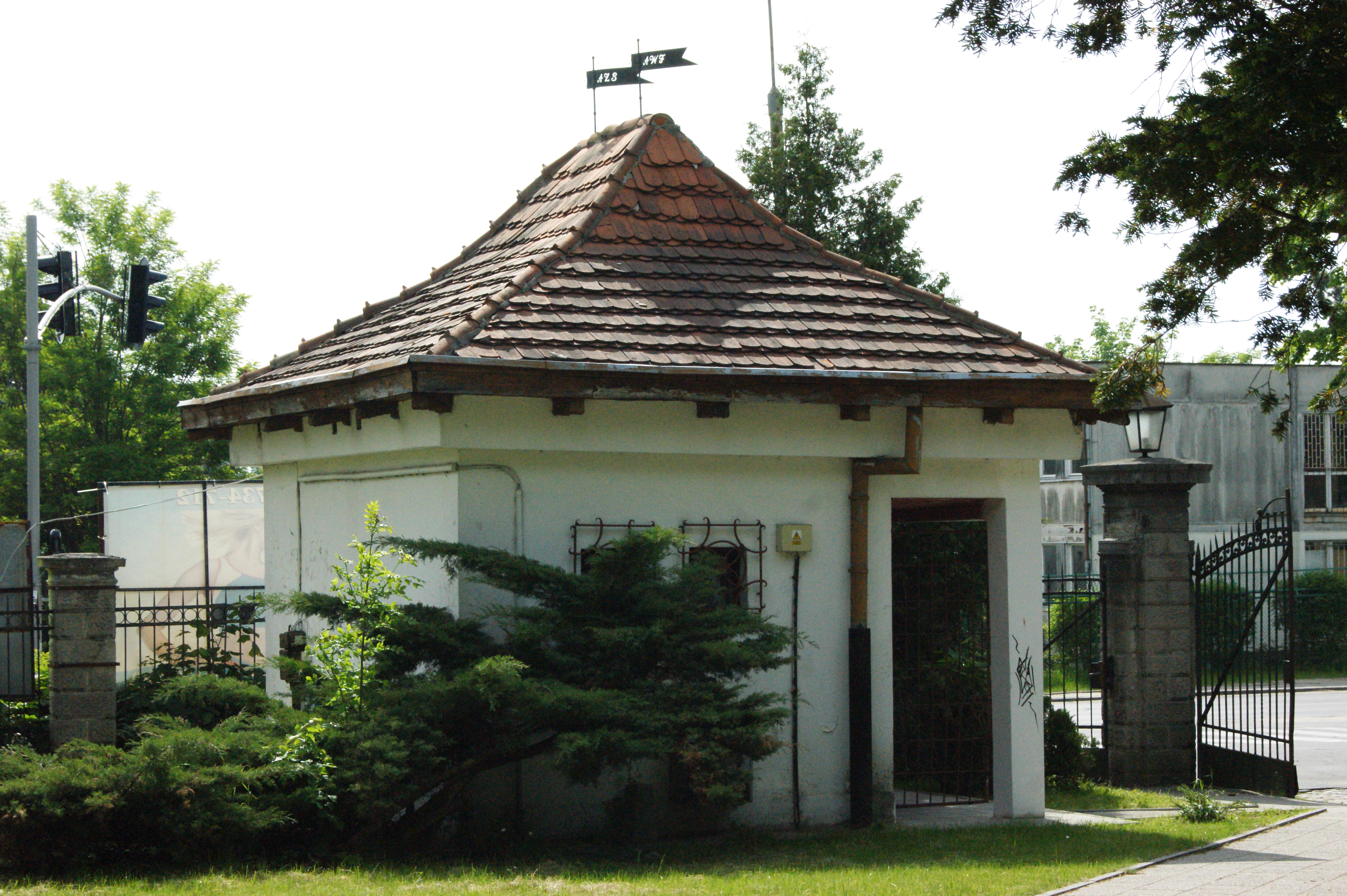 Gdańsk, zespół dworski Ludolphine, XIX, XX